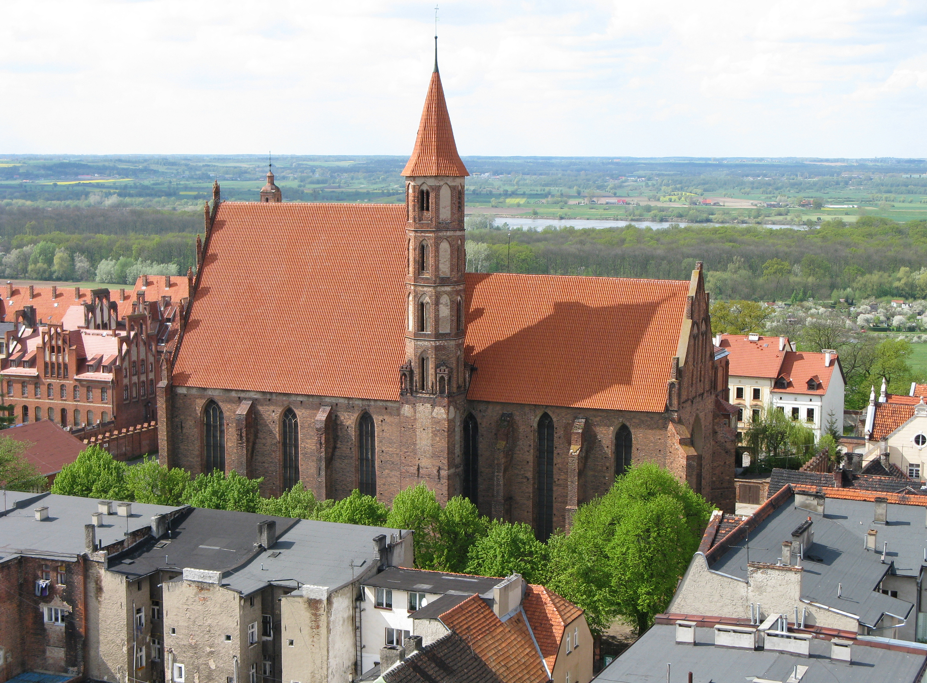 Kościół św. Jakuba i św. Mikołaja w Chełmnie